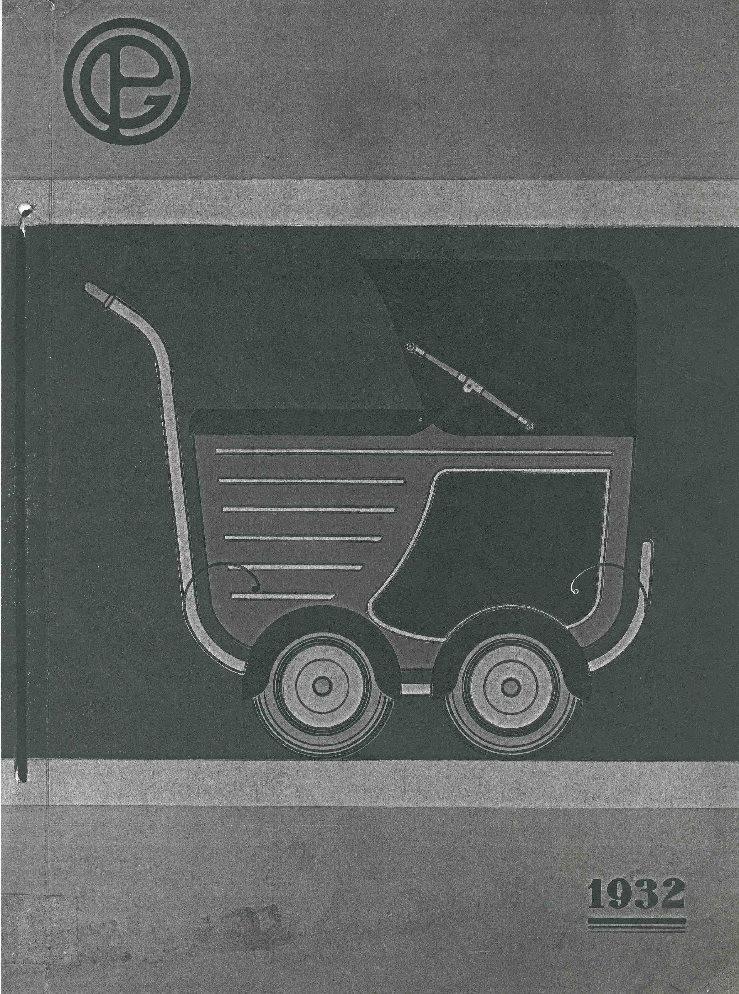 Brochure publicitaire. Production des Etablissements Guy, 1932. Archives municipales de Givors, NC, Recherche.